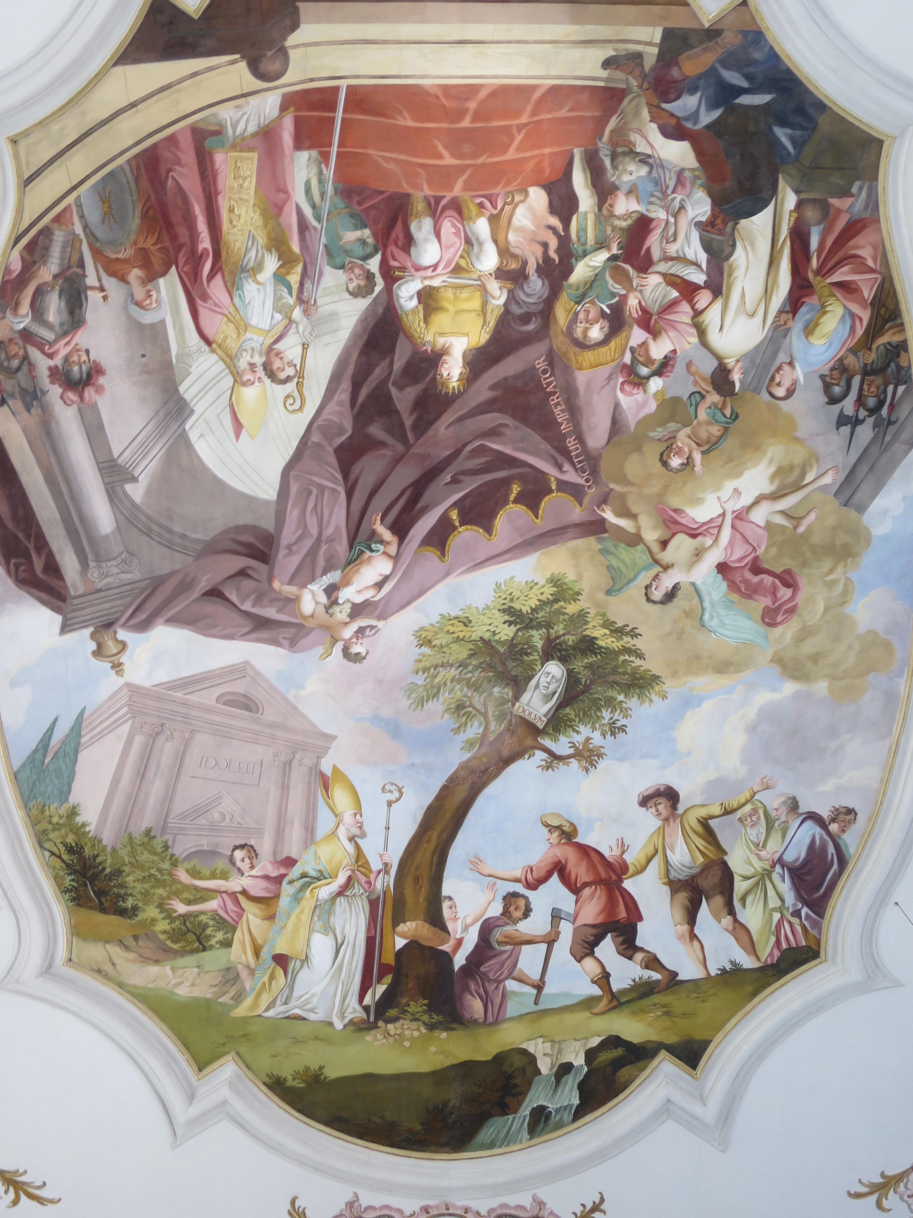 Langhausfresko von Fr.S. Kirzinger 1764ː Baumwunder